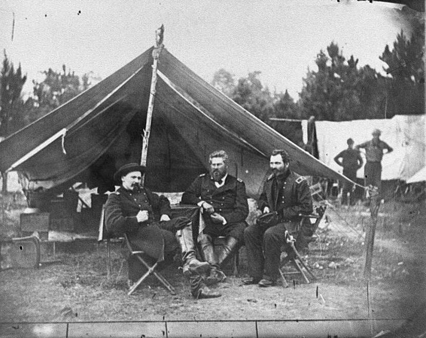 קולונל אלברט קולברן, קולונל דלוס סאקט וגנרל ג'ון סדג'וויק יושבים ליד הריסון לנדינג, במהלך מערכת פנינסולה במלחמת האזרחים האמריקנית